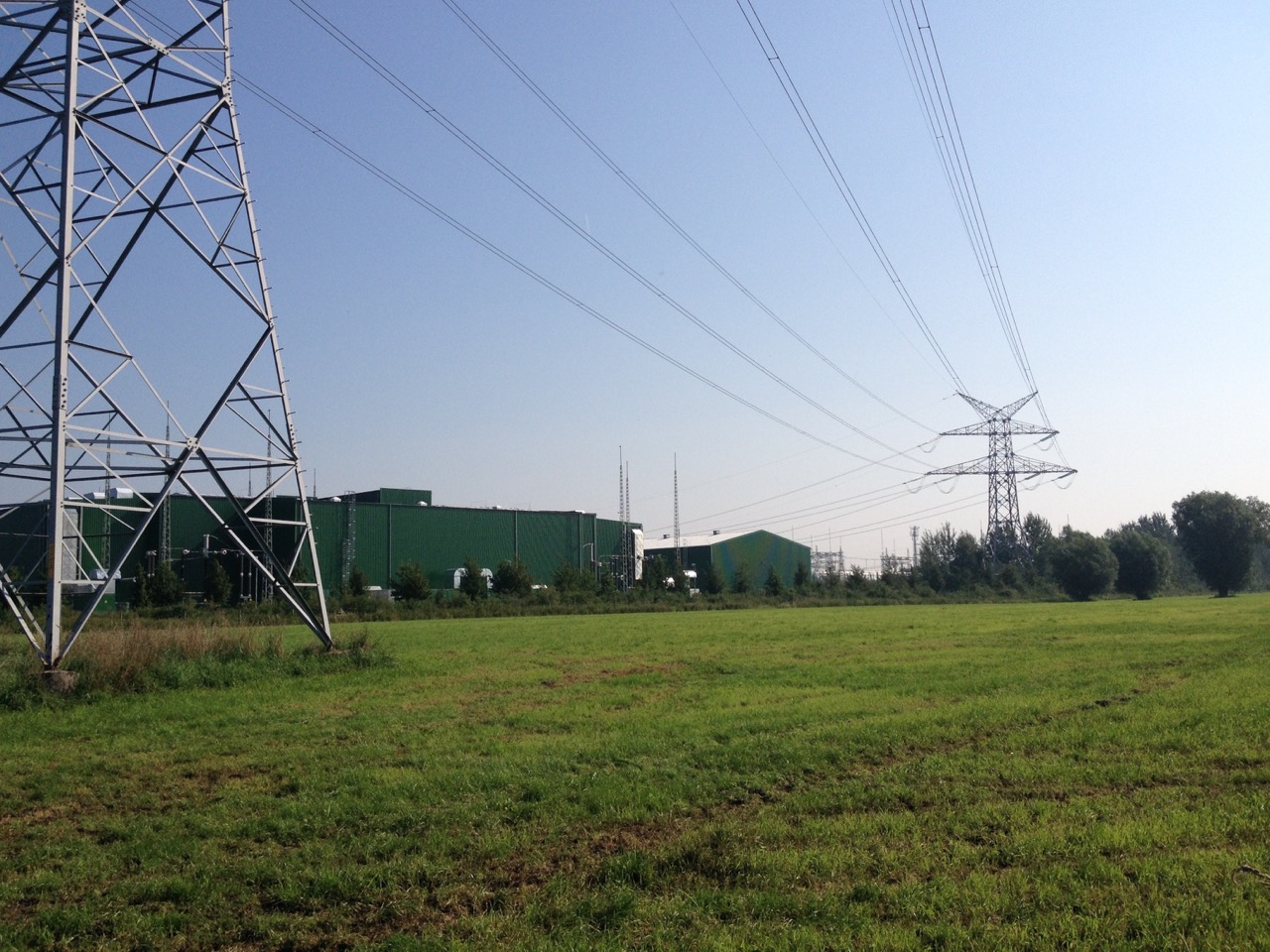 Umspannwerk Diele in Weener – Südansicht mit Konverterhallen; Stromrichterhalle für BorWin2 (links, Flachdach) und Stromrichterhalle für BorWin1 (rechts, Satteldach), 380-kV-Leitung nach Meppen (Emsland-West und Emsland-Ost)